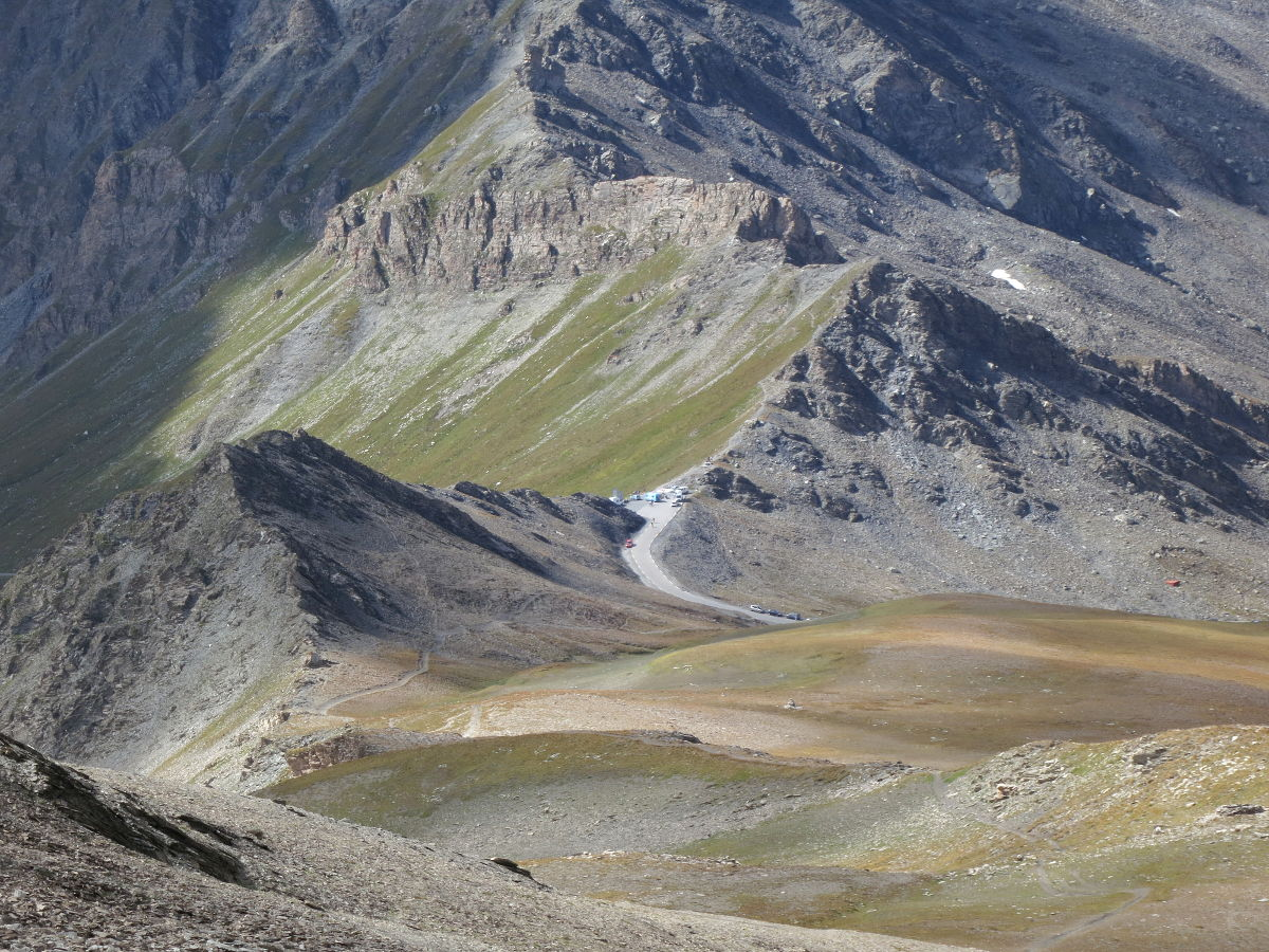 Col Agnel